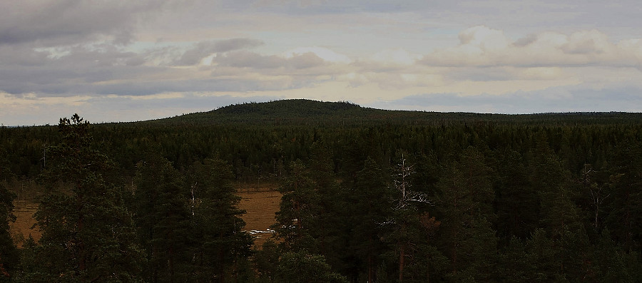 Гора Голец. Ветреный пояс. Республика Карелия